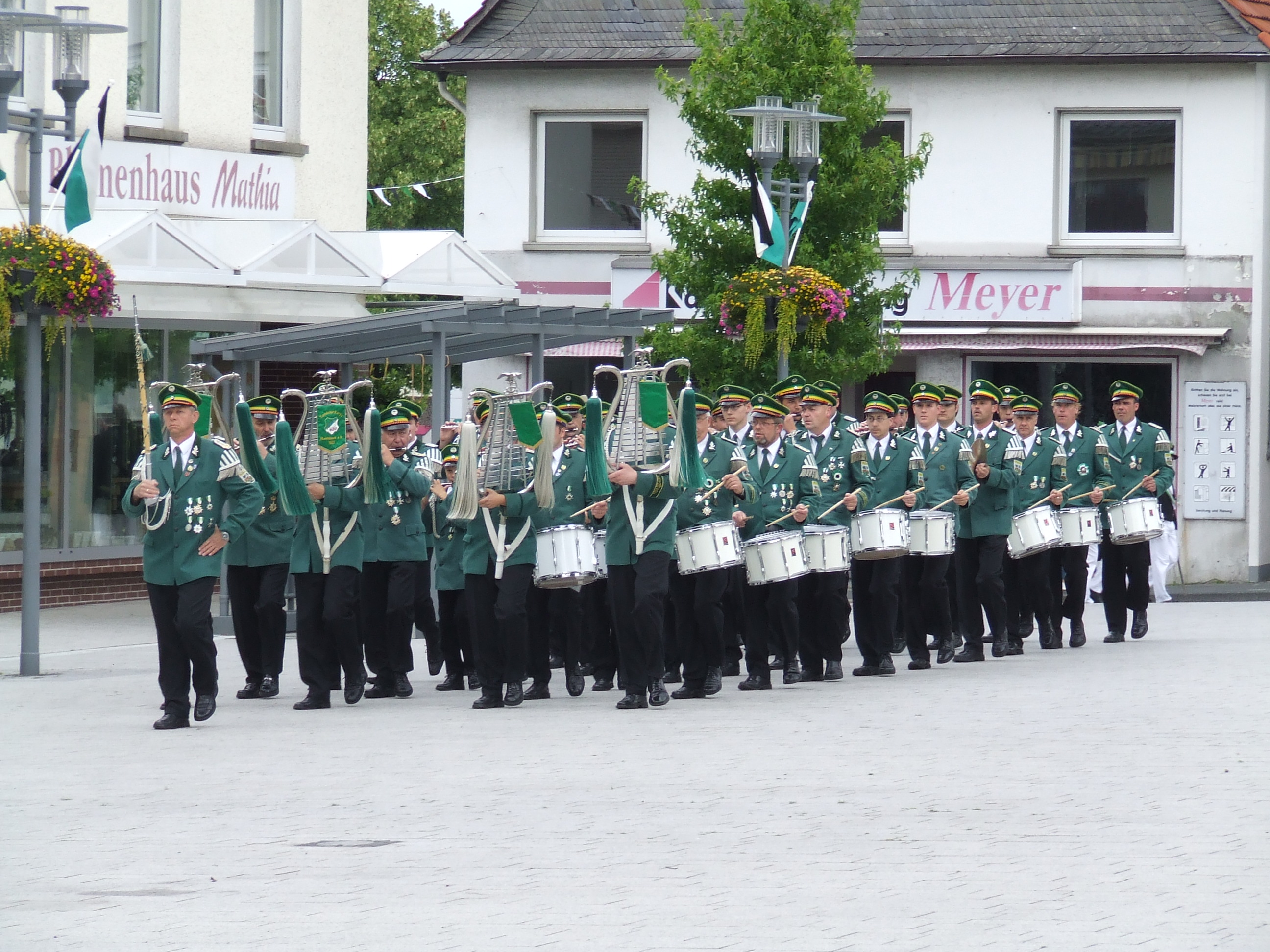 Der Spielmannszug Steinhausen marschiert beim Bürener Bürgerschützenfest 2008 zum Antreten auf den Marktplatz